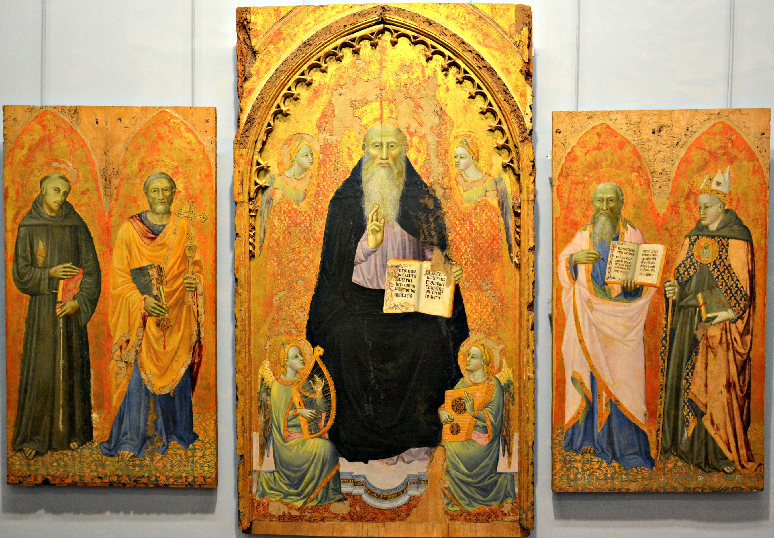 Vedi titolo